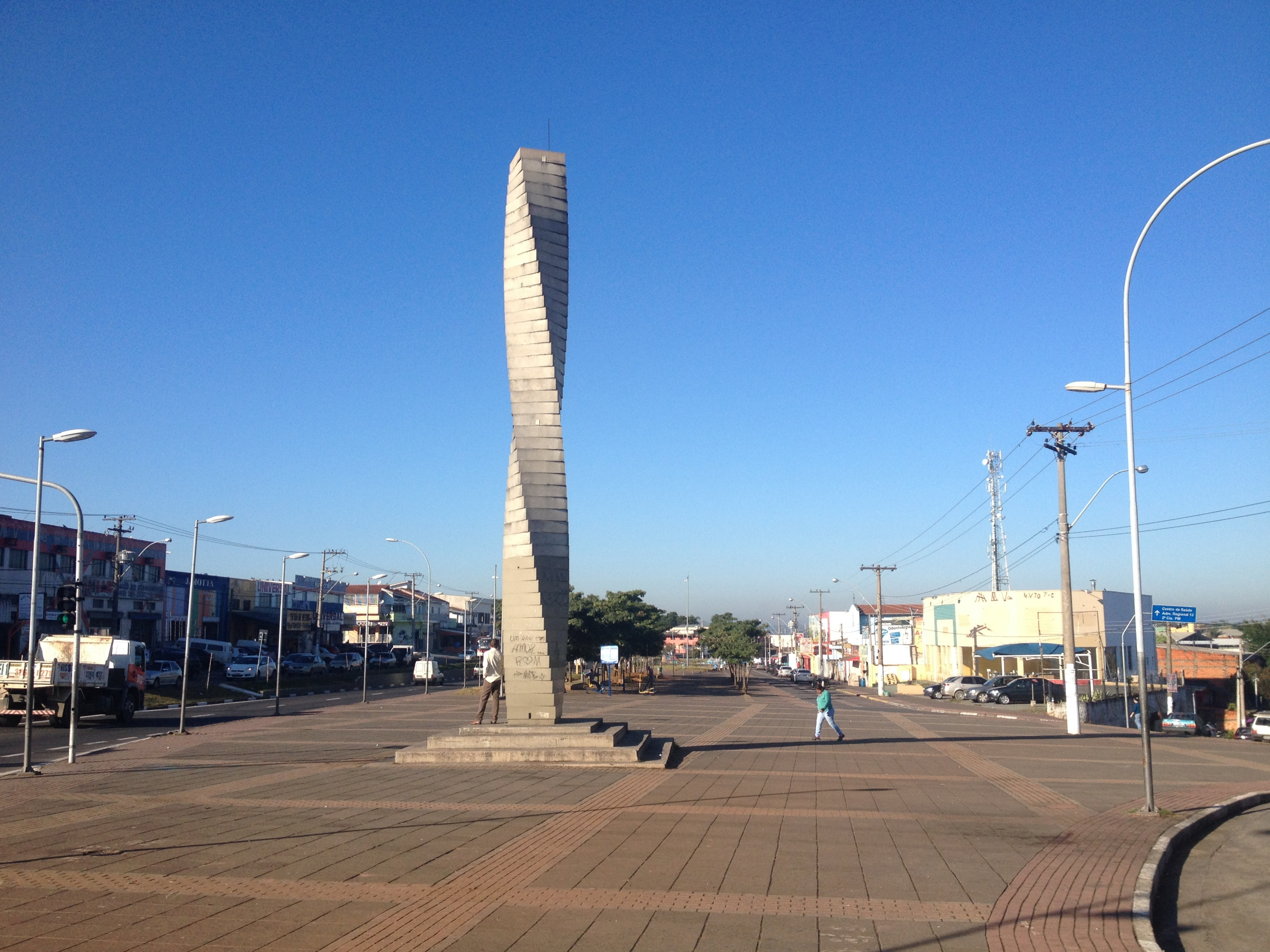 A Praça da Concórdia é a região central do distrito campineiro de Campo Grande. Situa-se no bairro Parque Valença.